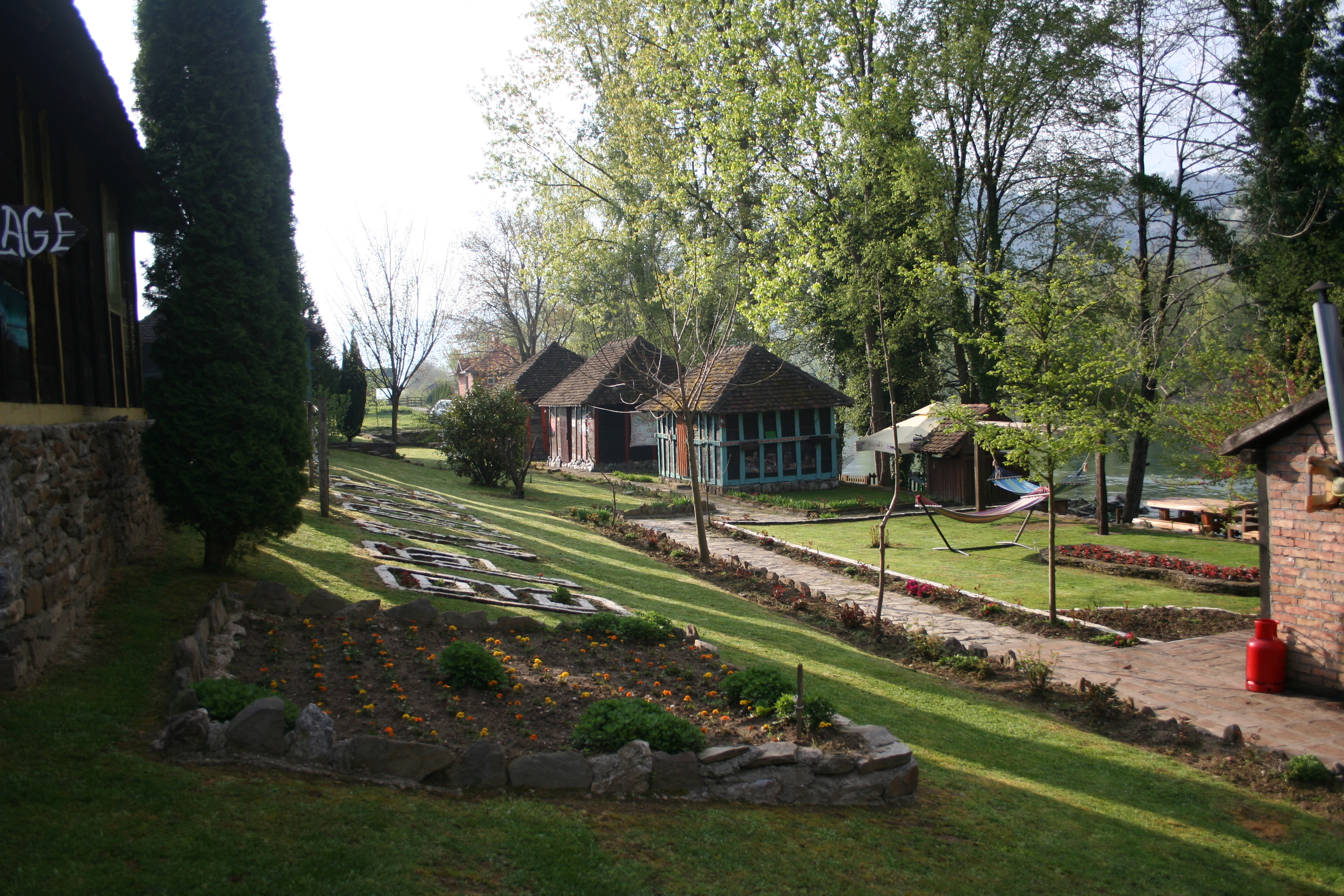 Etno selo Vrhpolje